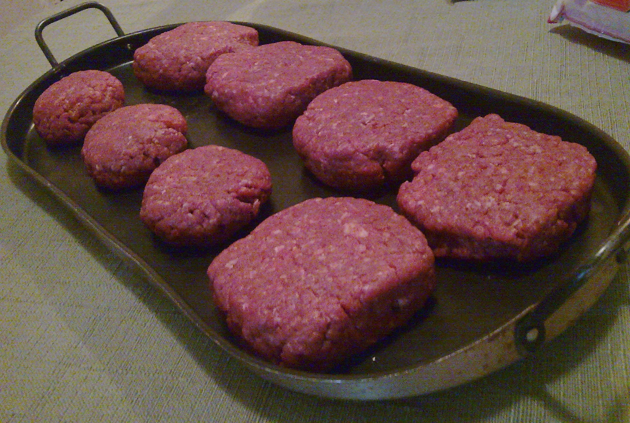 Carne de hamburguesa lista para cocinarse.